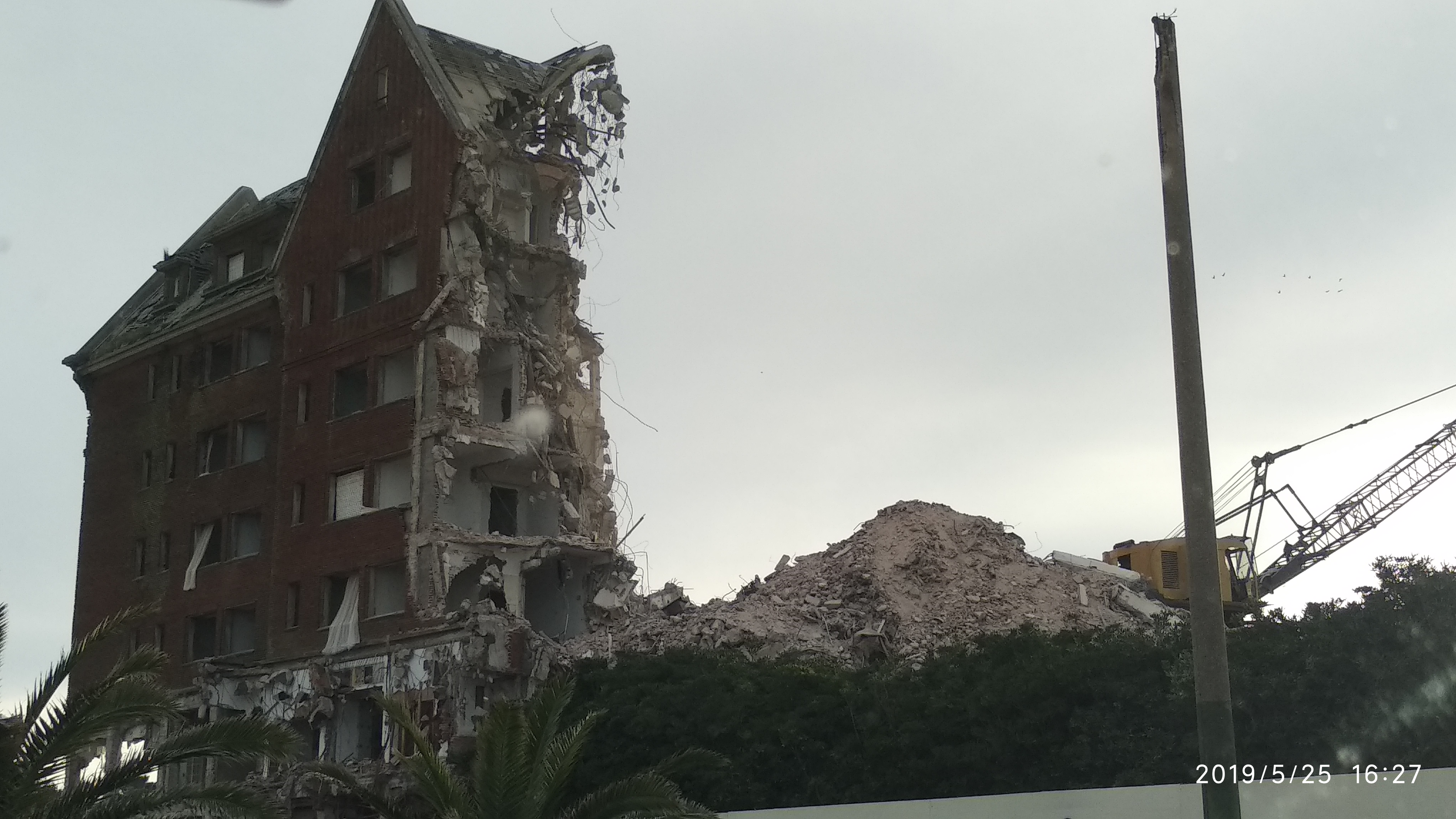 Hotel San Rafael Maldonado Uruguay Demolición